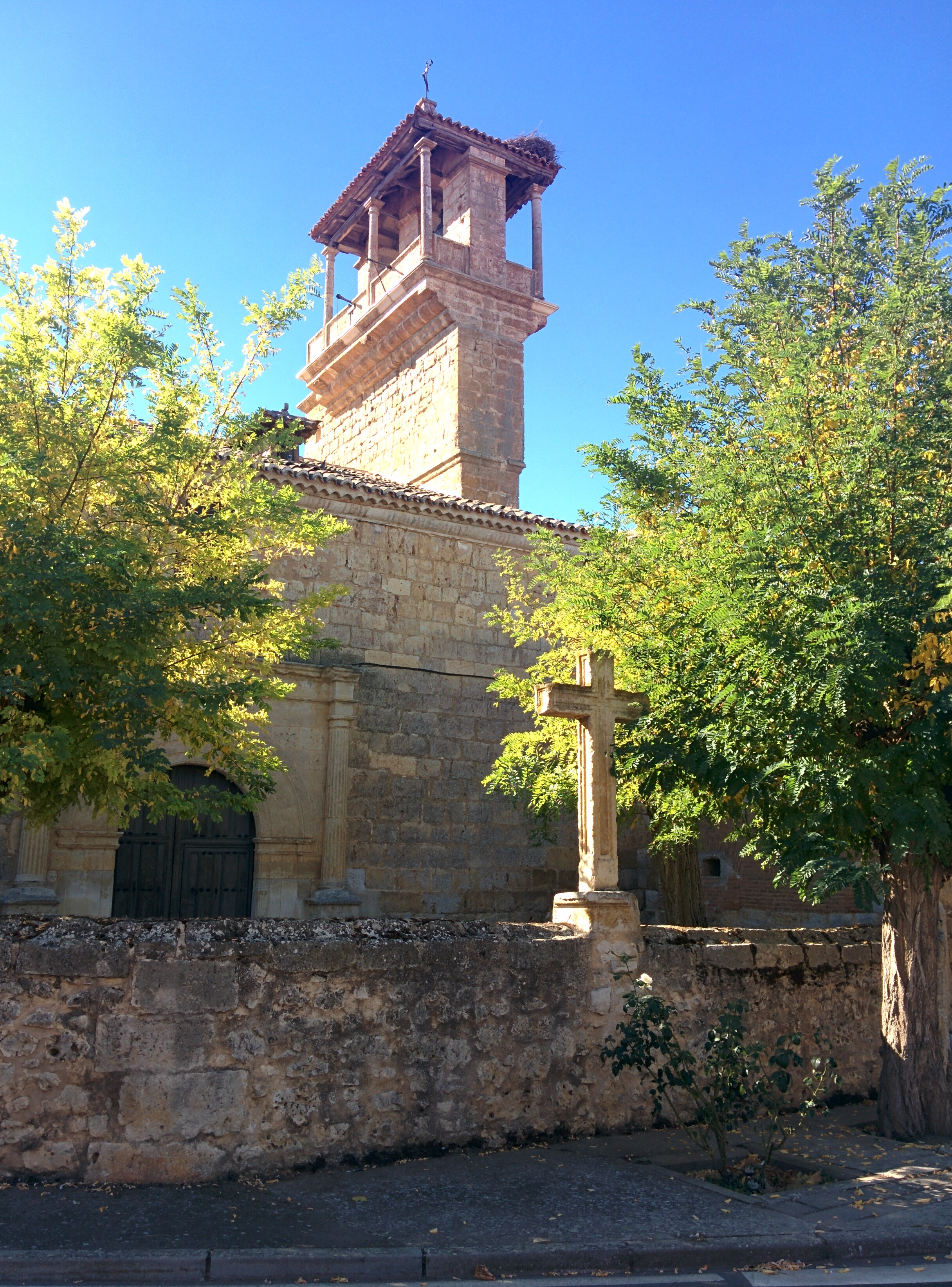 Iglesia de San Pedro Apóstol, en Villanueva de los Caballeros (Valladolid, España).